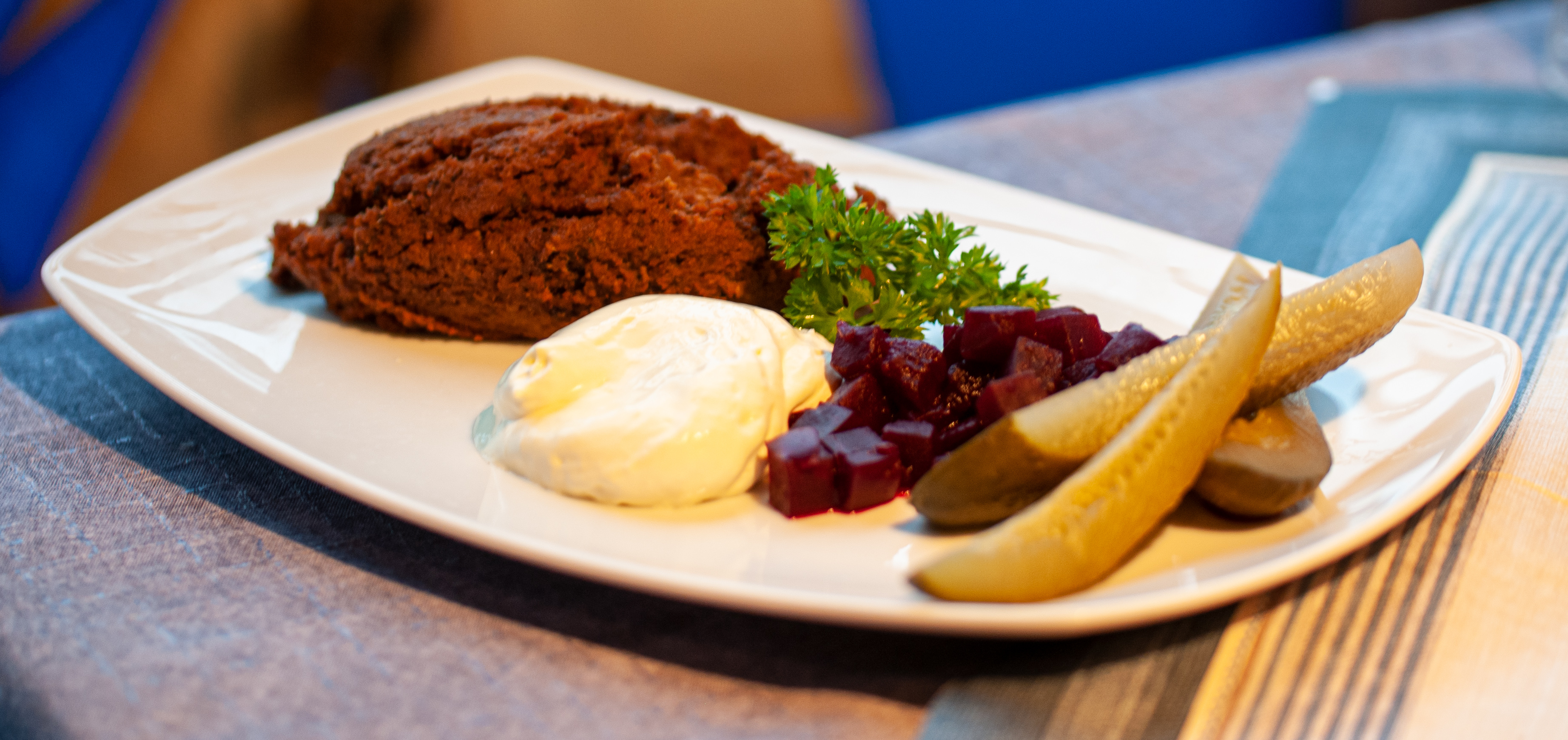 Vorschmack, finnisches Traditionsgericht